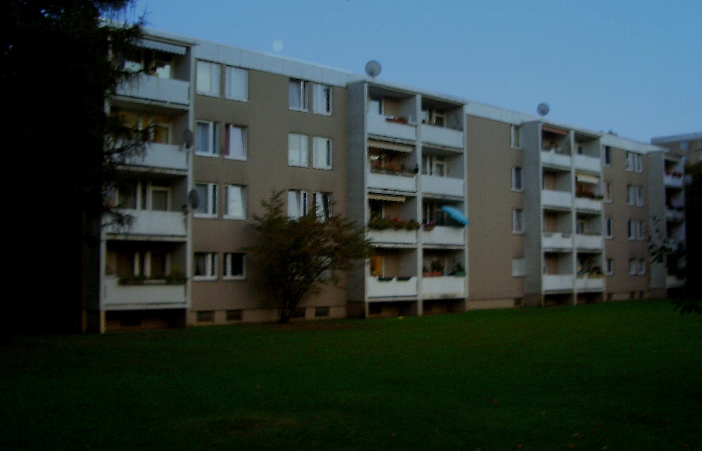 Wohnblock in Fideliopark München (errichtet für Sozialwohnungen)